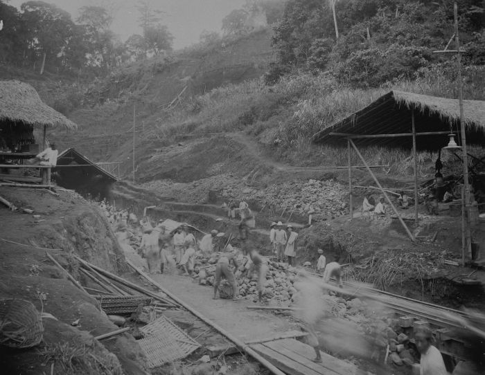 foto. Arbeiders bij een in aanbouw zijnde spoorwegtunnel in de bergen